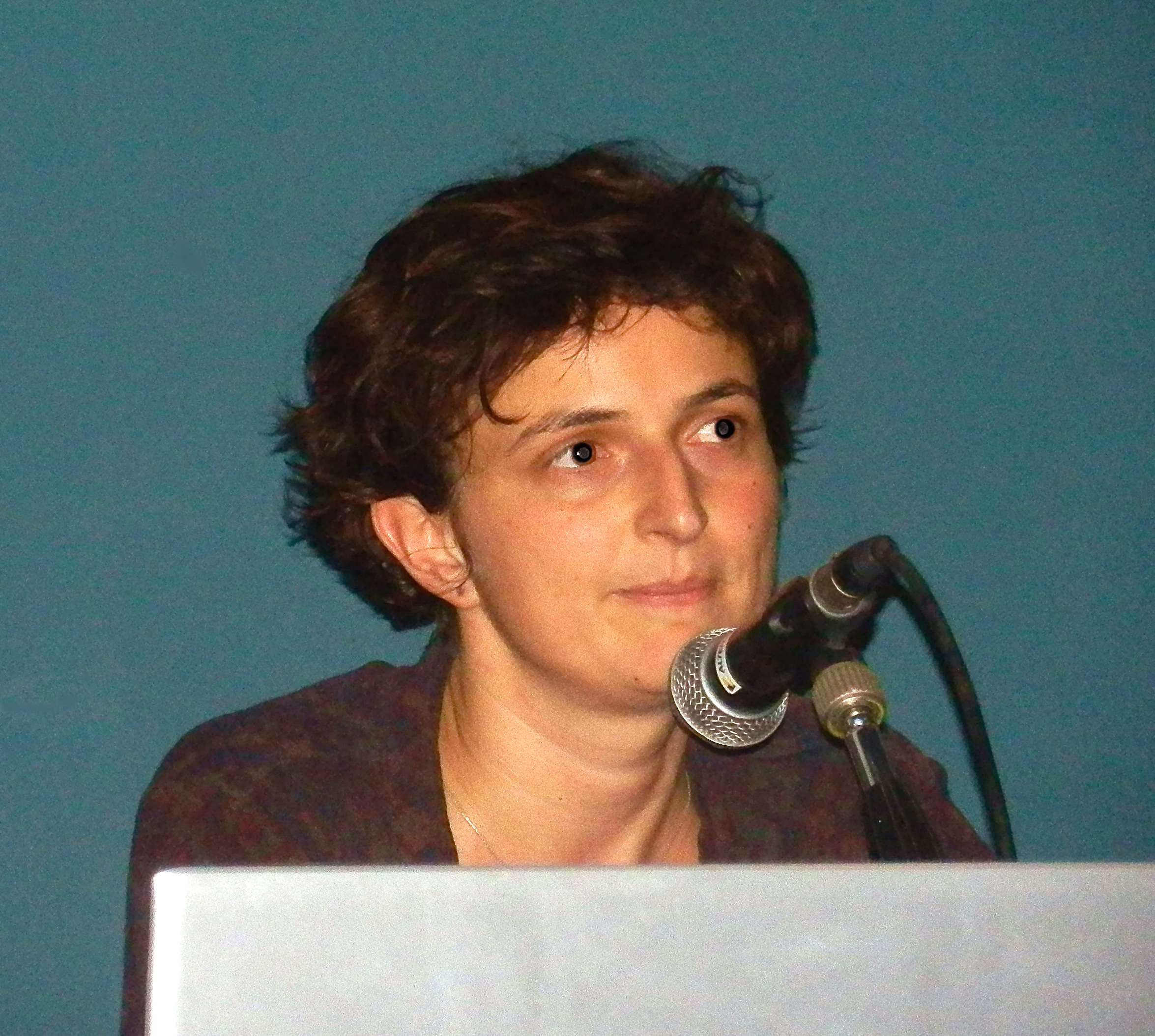 Alice Rohrwacher a Santarcangelo di Romagna durante il Festival del Teatro nel luglio 2014